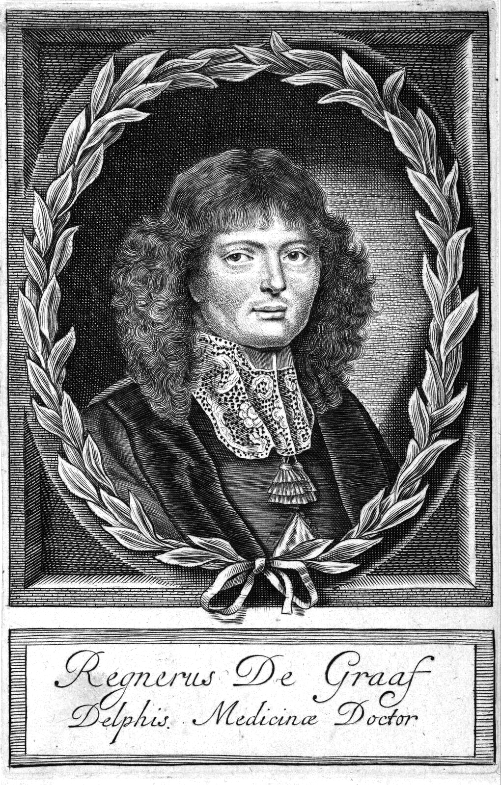 portret van Reinier de Graaf